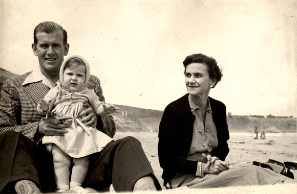 La esposa de Arturo Alessandri Rodríguez, Raquel Besa, con su hijo Arturo Alessandri Besa y la hija de este, Patricia Alessandri, en la playa.